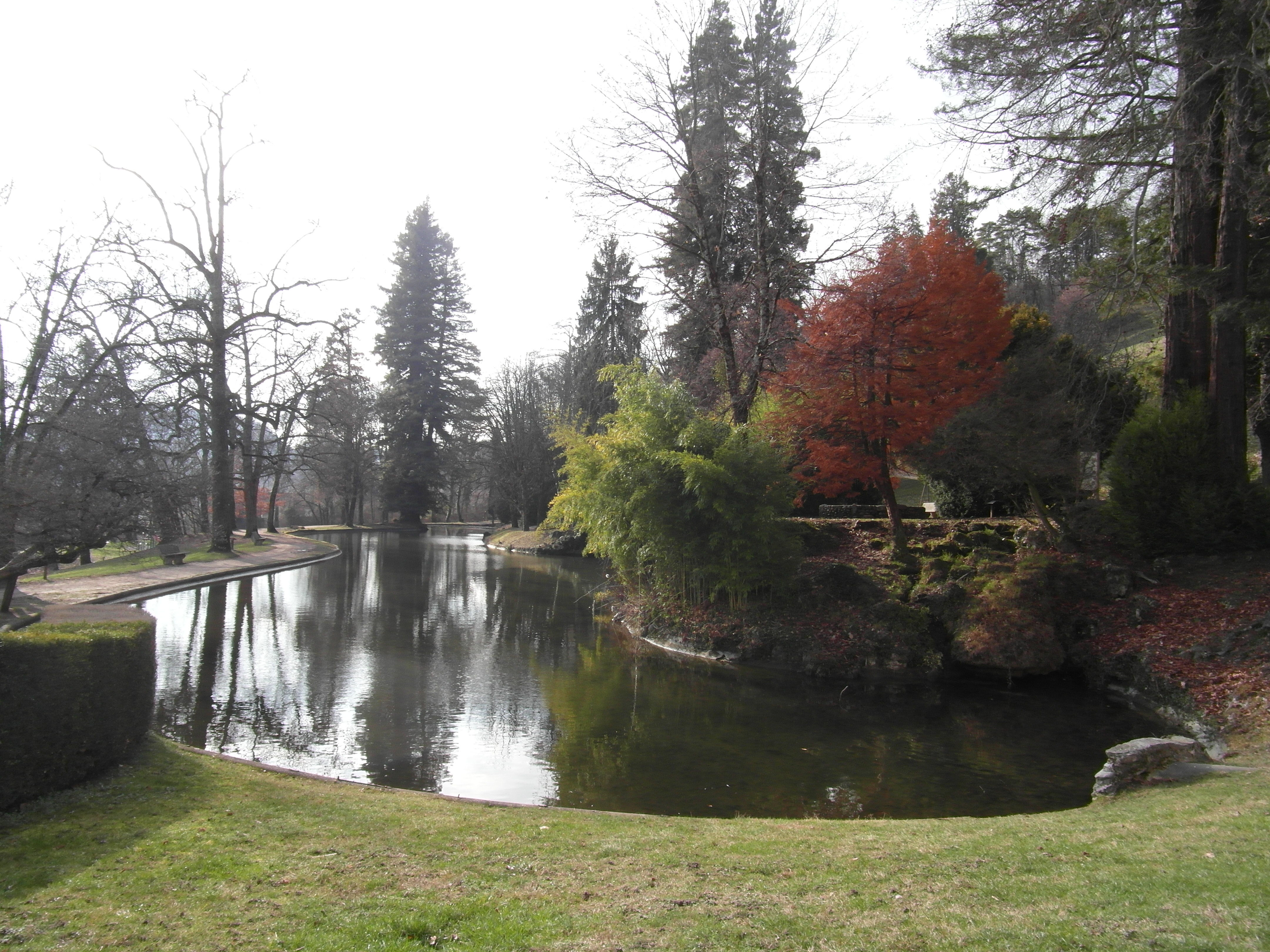 Parc de la mairie de Tullins